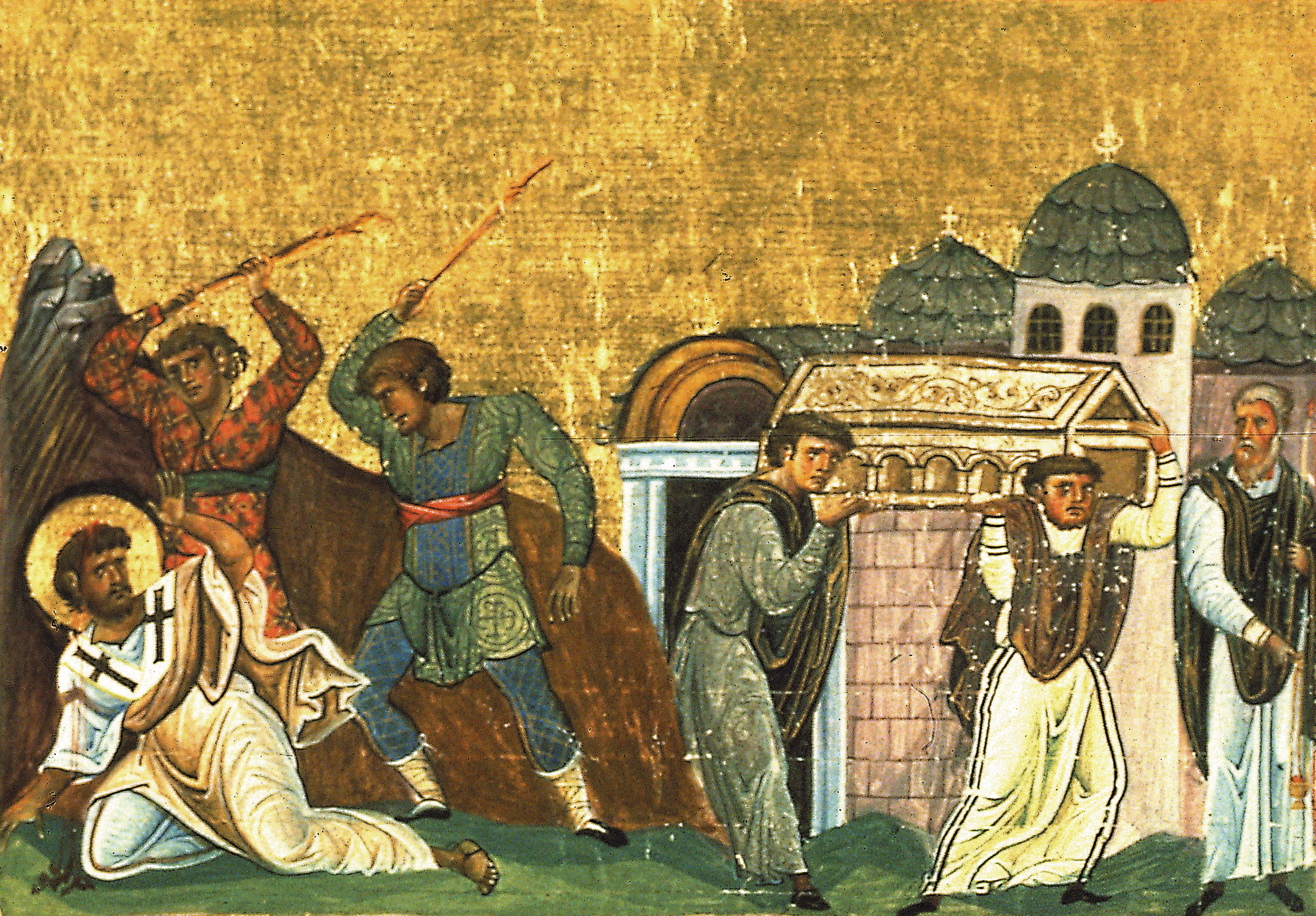 Святитель Тимофей , епископ Ефесский, апостол от 70-ти, сщмч. Константинополь. 985 г. Миниатюра Минология Василия II. Ватиканская библиотека. Рим.